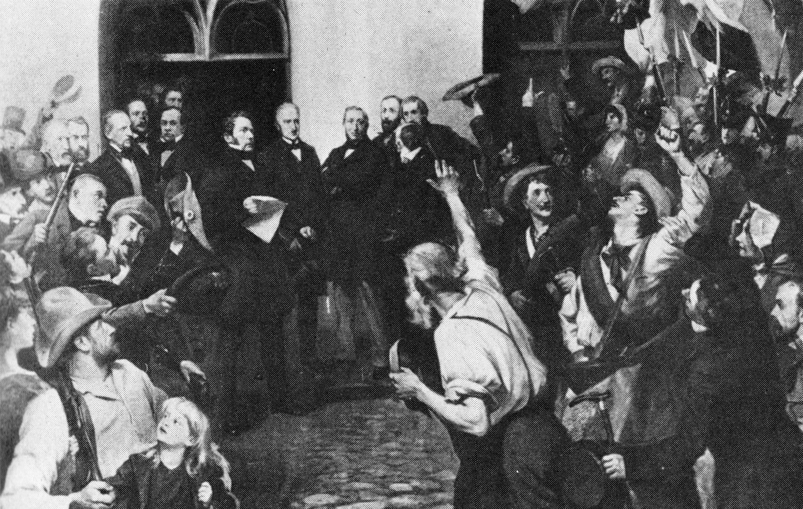 Gemälde von Kleinsang. Vor dem Rathaus in Kiel wird die Provisorische Regierung von Schleswig-Holstein proklamiert. Mitte: Wilhelm Hartwig Beseler mit der Proklamation. Außerdem Friedrich Prinz zu Schleswig-Holstein-Sonderburg-Augustenburg, Martin Thorsen Schmidt, Ahlmann, Lorentzen.